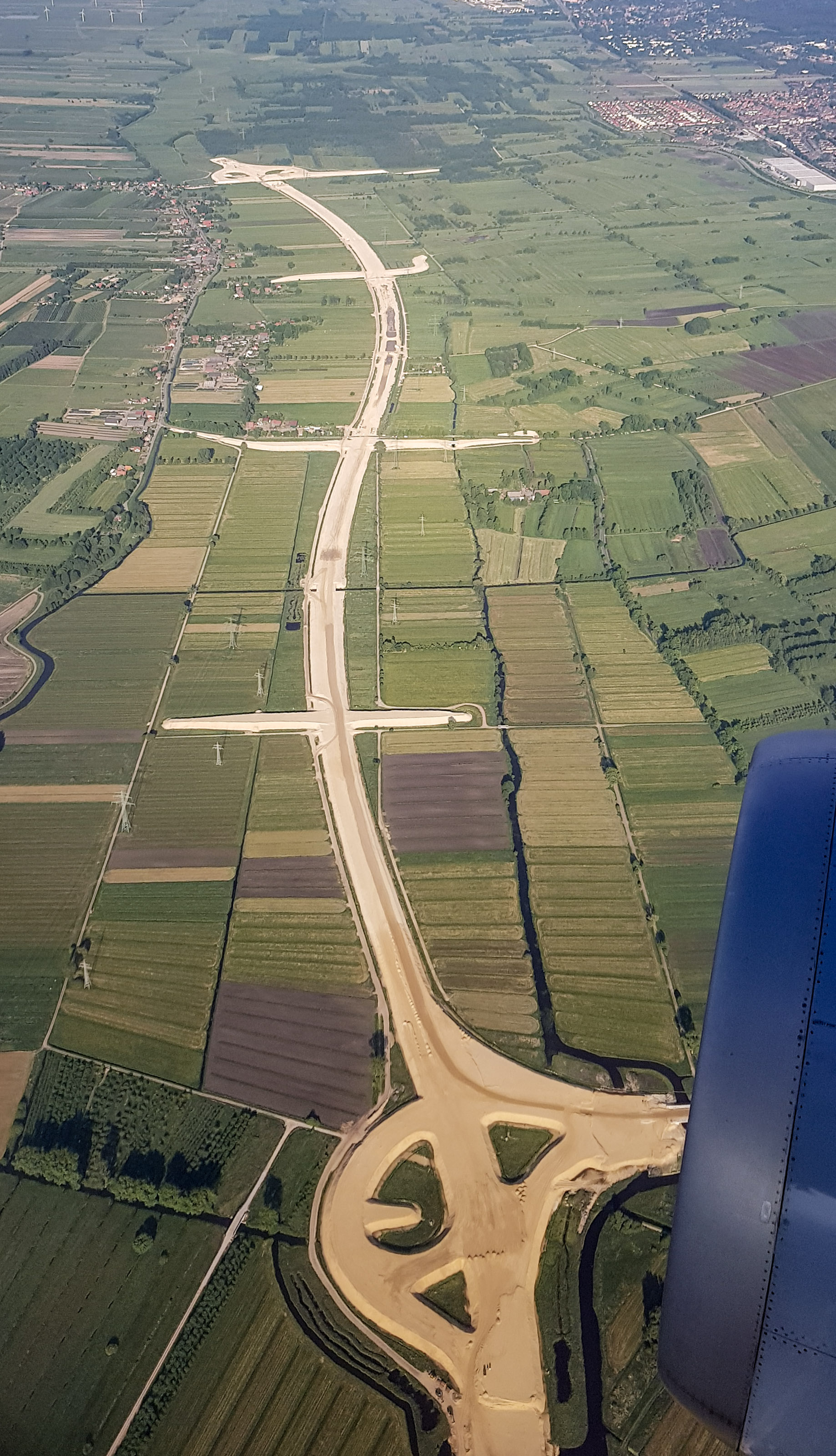 BAB 26 Bauabschitt 3, Blickrichtung: Osten